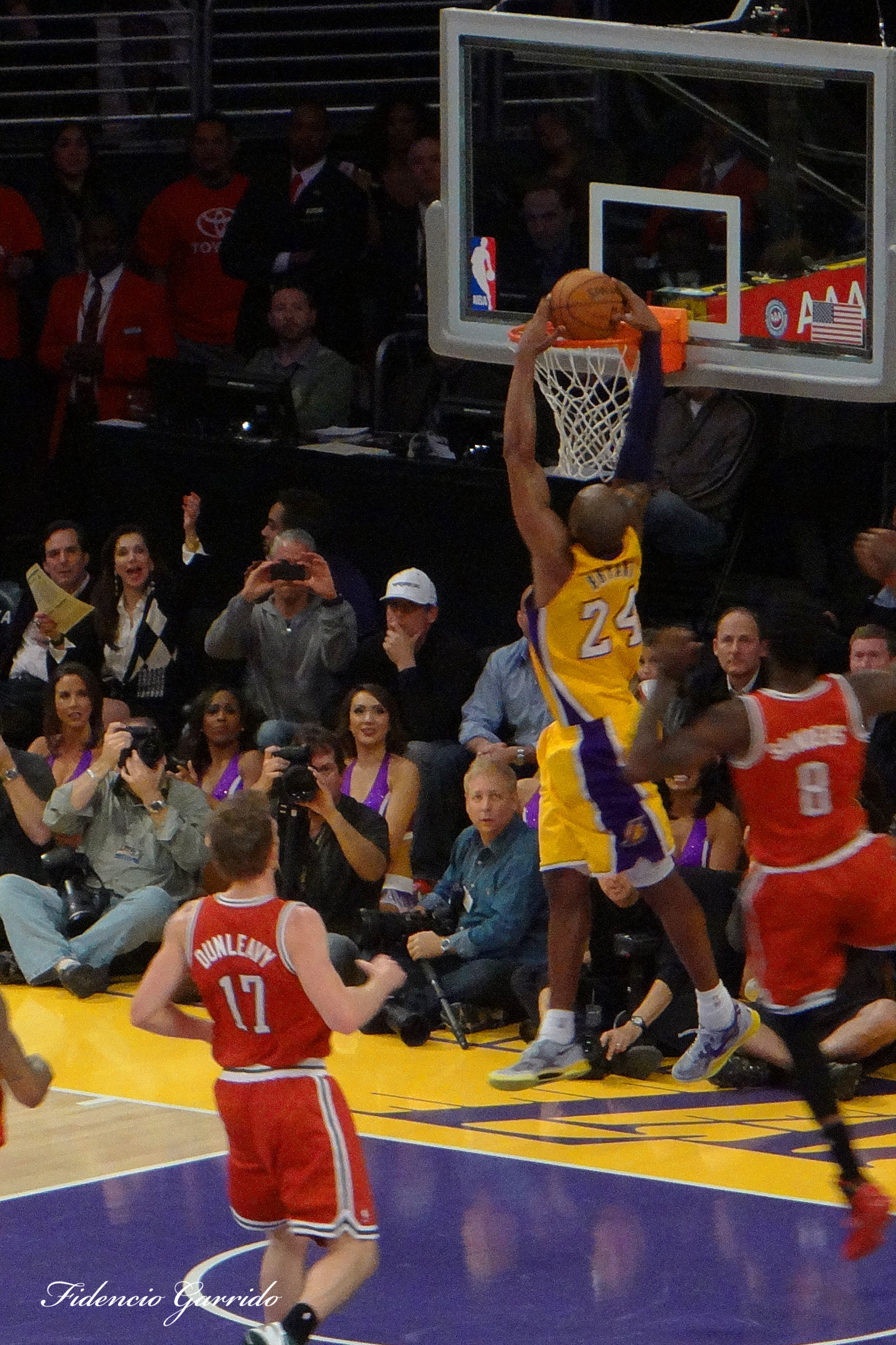 Bucks @ Lakers Staples Center 1/15/2013